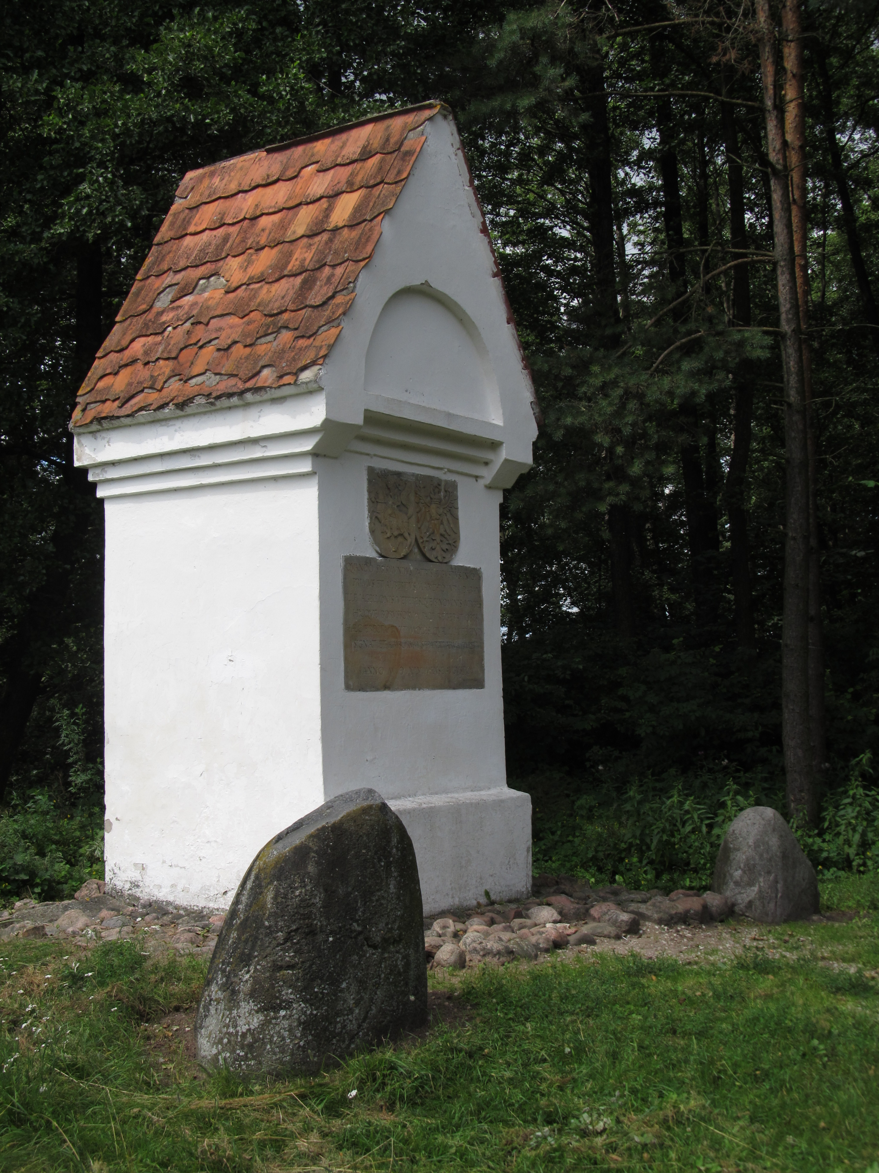 Bogusze - historyczny słup graniczny na dawnej granicy Korony Królestwa Polskiego i Prus Książęcych (zabytek nr A-586 z dn. 29.12.1964)